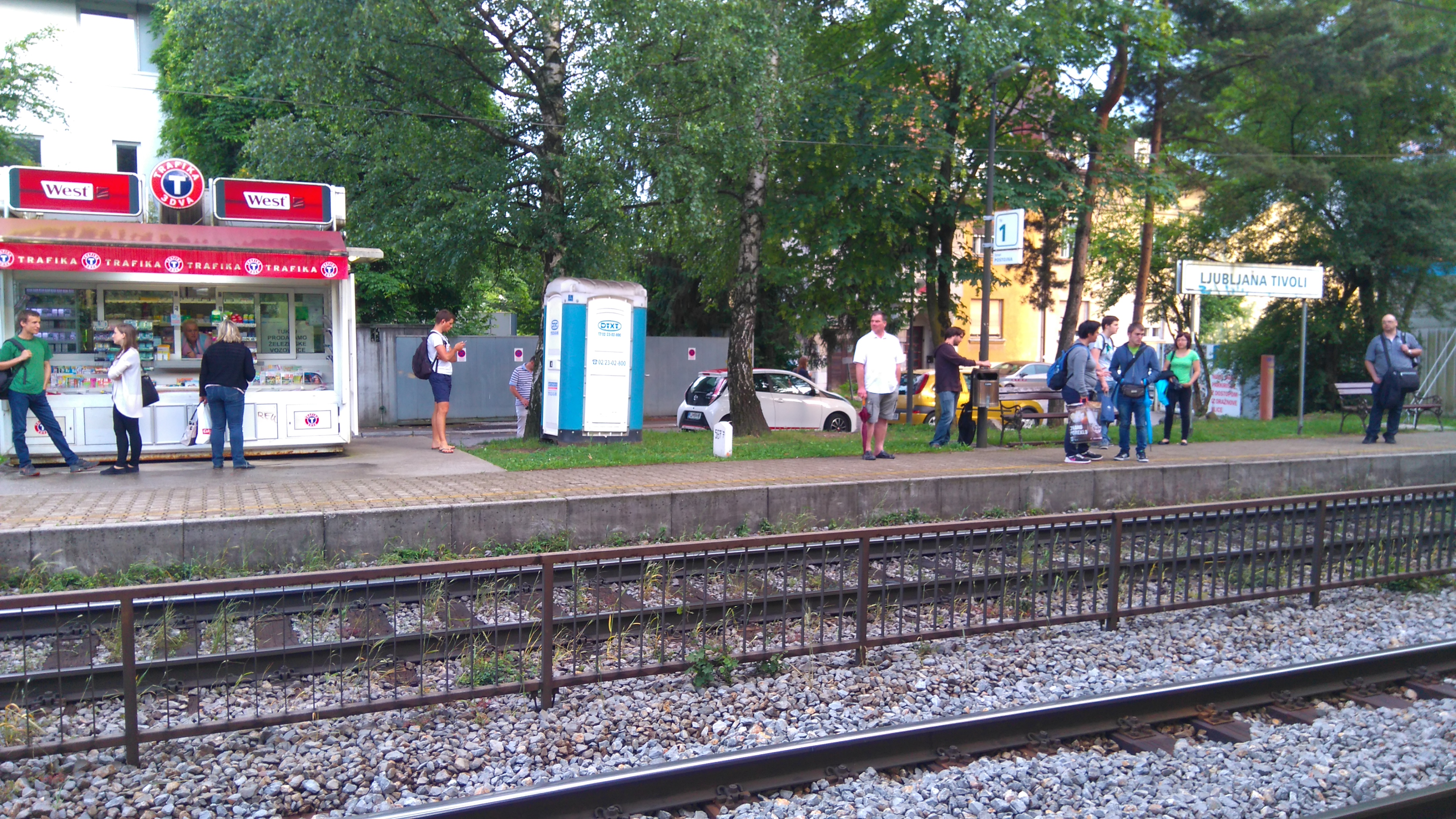 Ljubljana Tivoli rail halt.